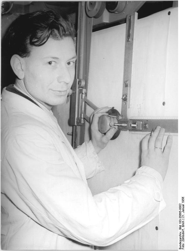 Ingenieur am Reissbrett Zentralbild Zühlsdorf Bn-Th 21.1.1956 Stellungnahme und Verpflichtung zur Nationalen Volksarmee. UBz: Der Kollege Günter Hoffmann, Teilkonstrukteur im VEB-Funkwerk Köpenick sagte zu dem Volkskammerbeschluß:"Die Regierung der Deutschen Demokratischen Republik hat am 18.1.1956 das Gesetz über die Schaffung der Nationalen Volksarmee und das ministeriums für Nationale Verteidigung beschlossen. In diesem Beschluß sehe ich die Garantie für die weitere friedliche Arbeit unserer Menschen. Deshalb erkläre ich mich bereit, der Nationalen Volksarmee sofort beizutreten und meine Pflicht als Arbeiter, als Kandidat der Sozialistischen Einheitspartei Deutschlands und als Deutscher ehrlich zu erfüllen. Natürlich würde ich lieber meine Arbeit am Reißbrett versehen, oder auf die Ingenieurschule gehen und lernen, selbst zu konstruieren. Aber ich habe einen Sohn und eine Tochter, die ich sehr liebe und deshalb will ich meine ganze Kraft einsetzen, damit meine Kinder leben und lernen können und nicht an der Atompest sterben müssen.